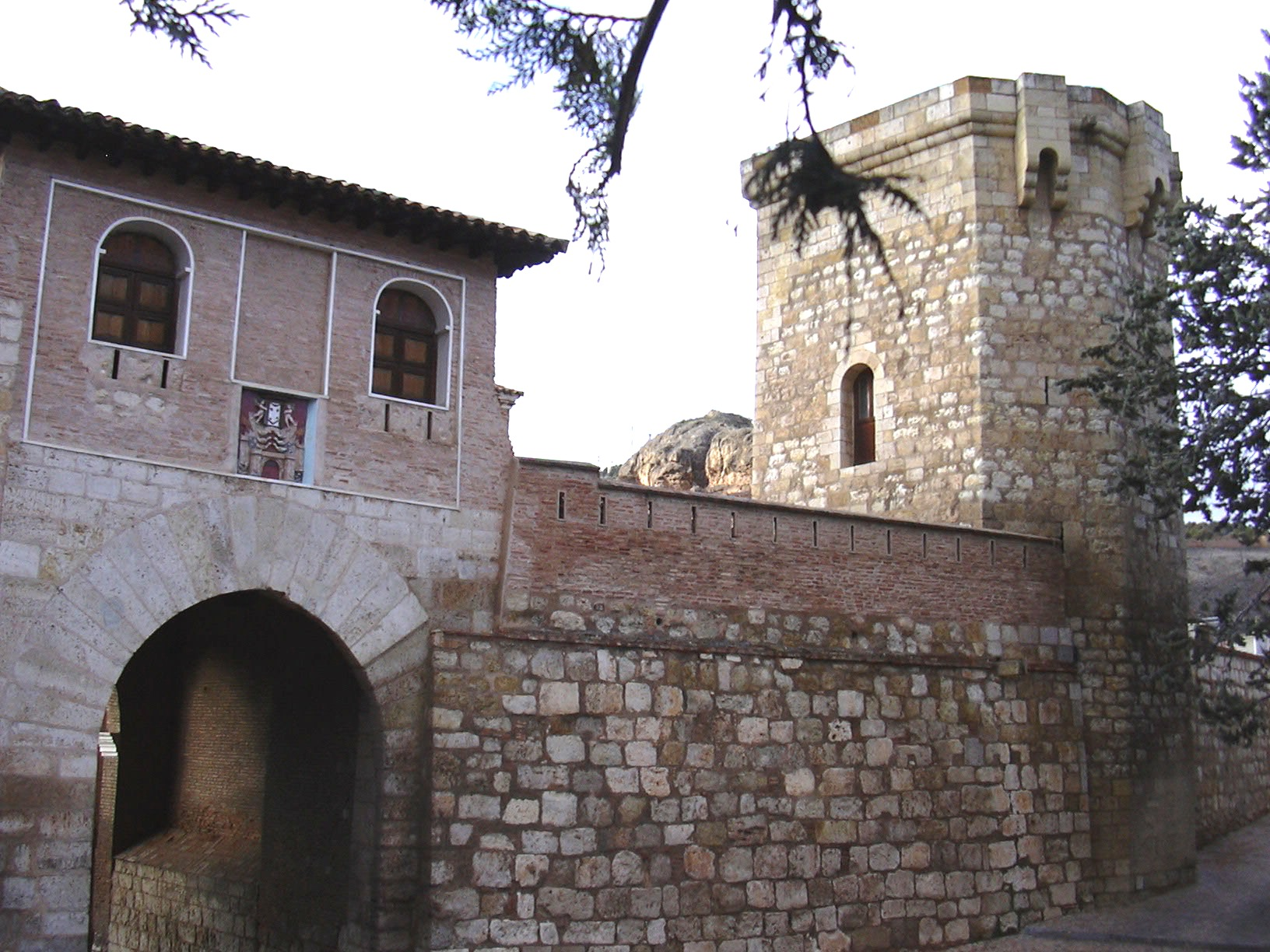 Daroca - Puerta Alta